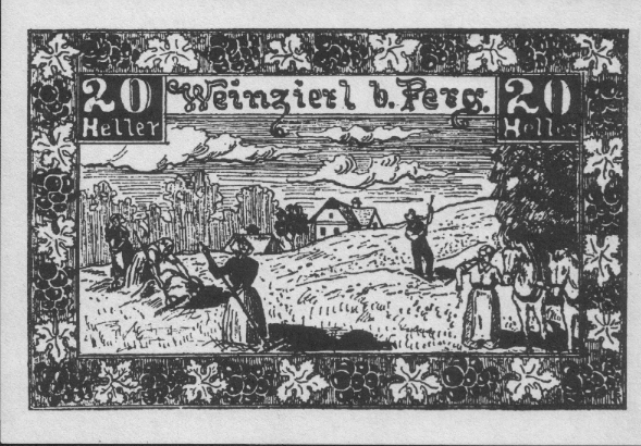 Die Mannersäge abgebildet auf einem Notgeldschein der Gemeinde Weinzierl bei Perg